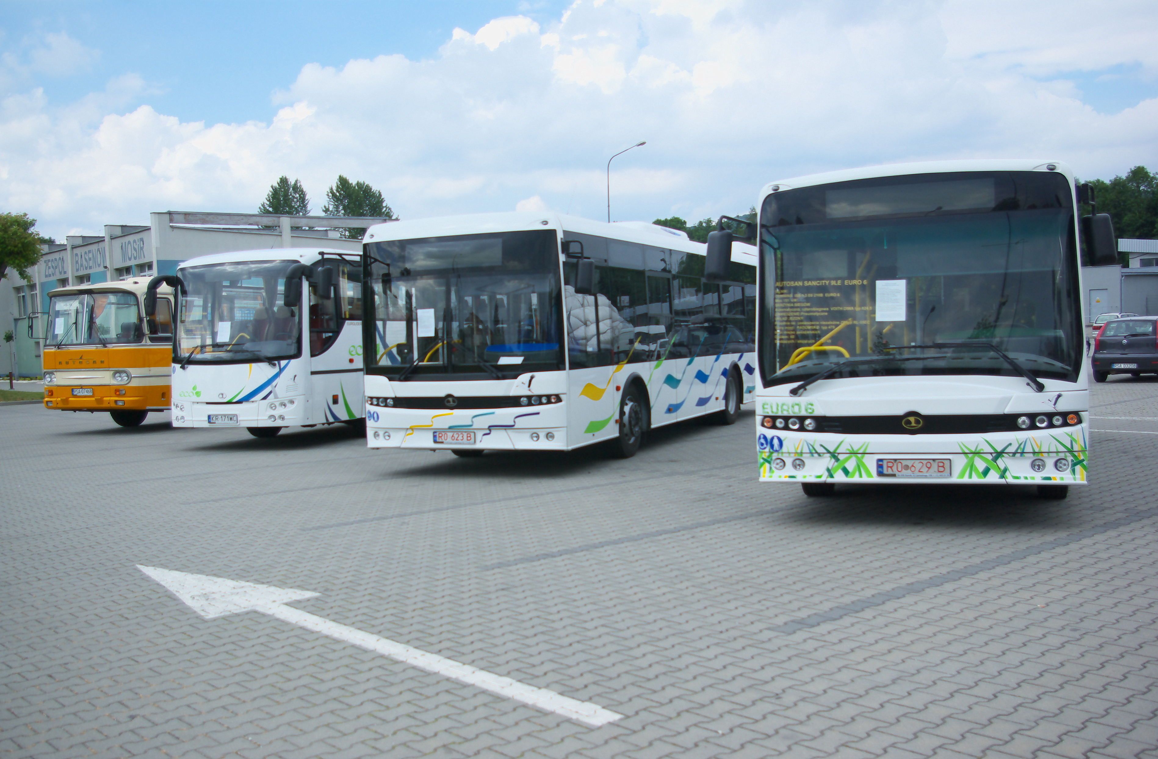 Modele autobusów Autosan wystawione przy Arenie Sanok w 2014